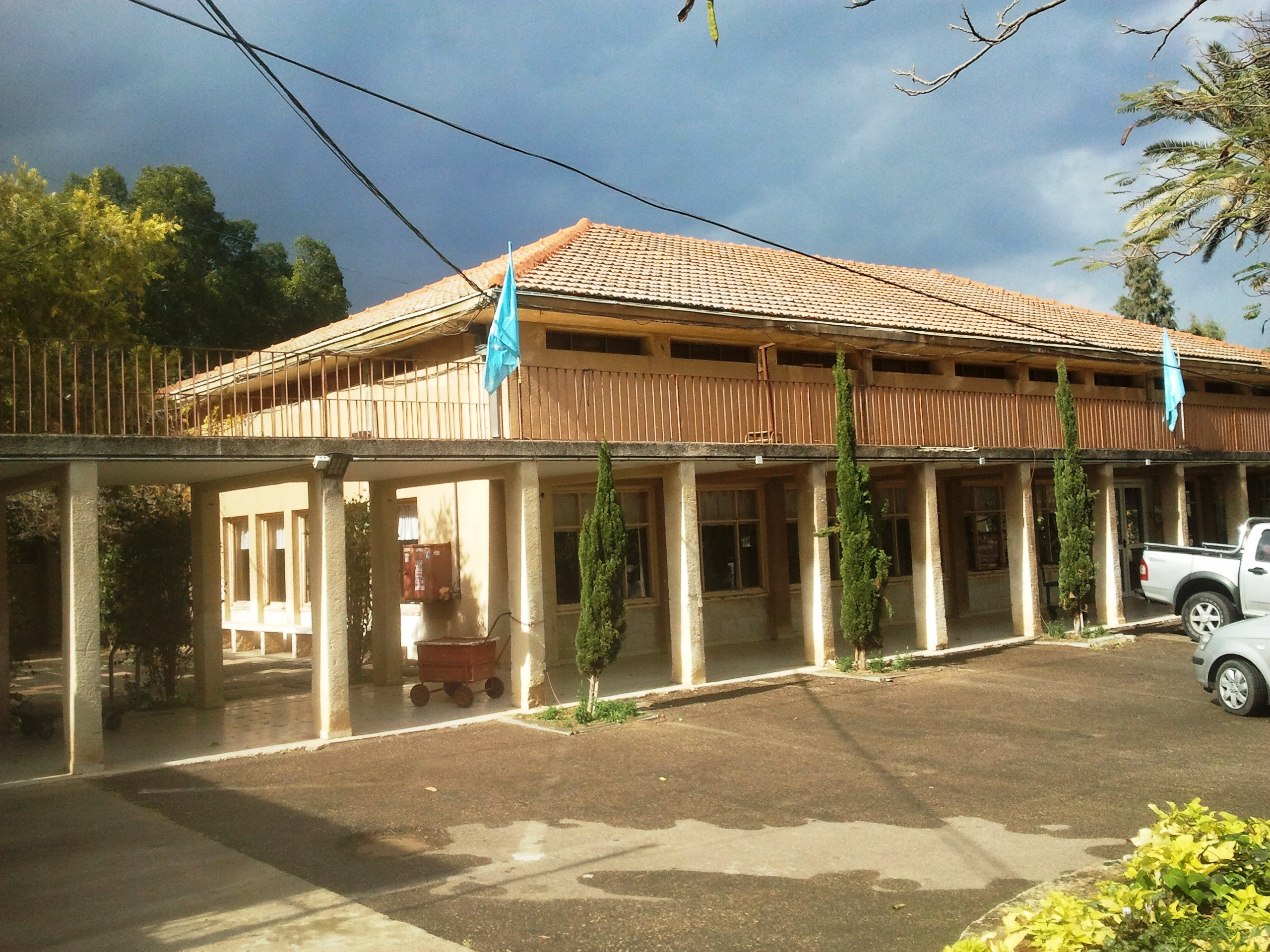 חדר האוכל של קבוצת כנרת